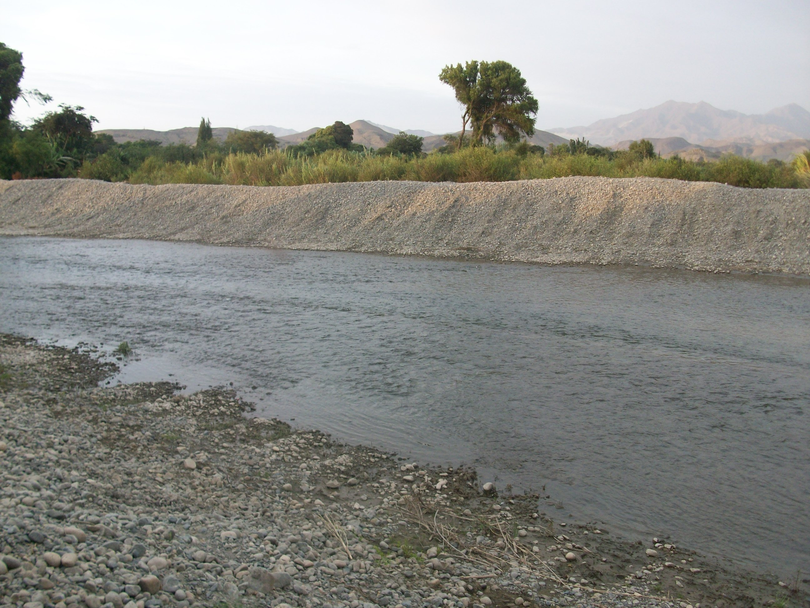 Río Huarmey, Ancash, Perú.